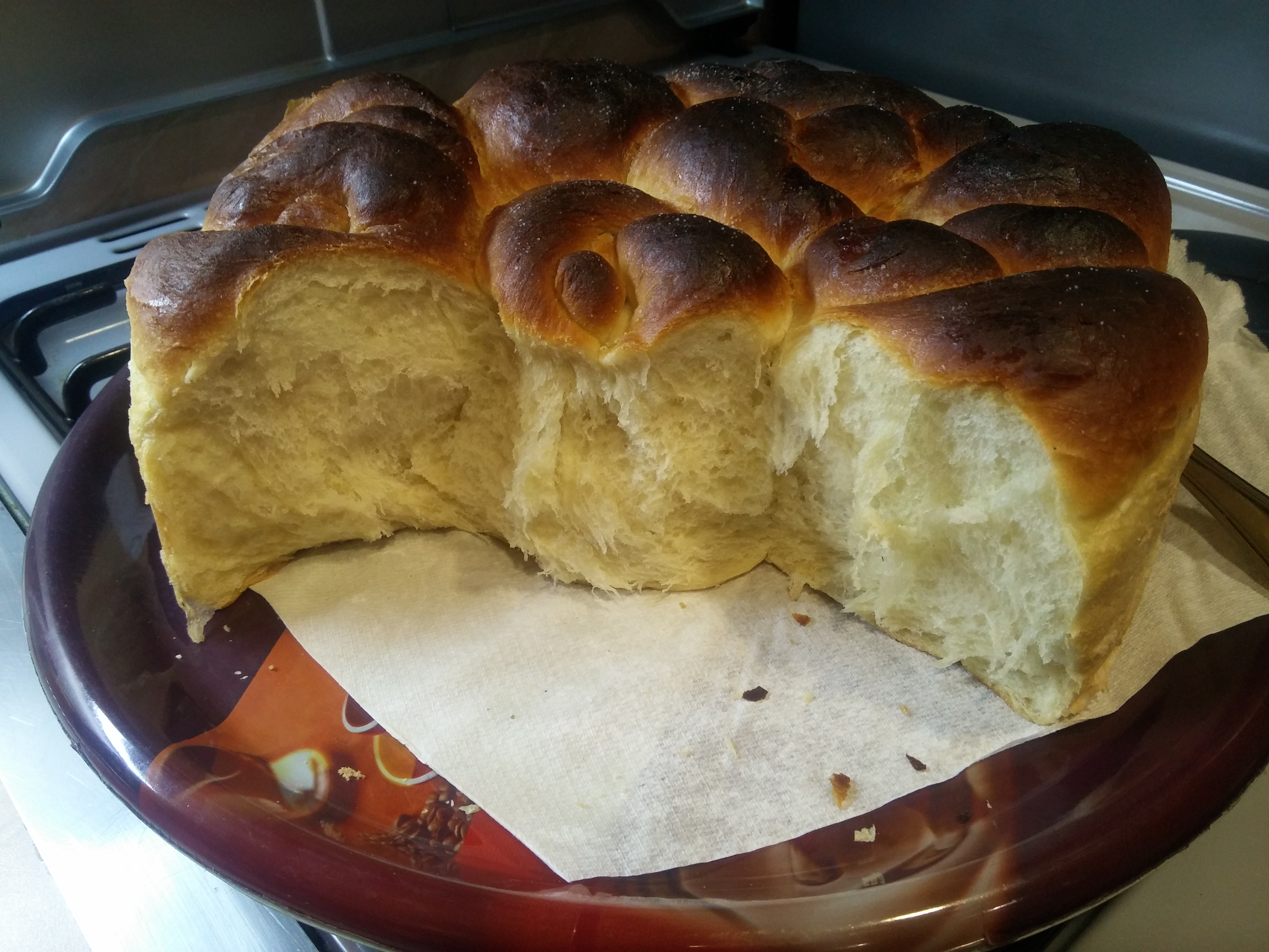 Погача - традиционен ръчен хляб. Популярна е в България и Република Македония, Босна и Херцеговина, Хърватия, Словения, Сърбия, Черна Гора, Унгария, Гърция (където се нарича μπουγάτσα, бугаца) и в Турция (където се нарича poğaça, поача).